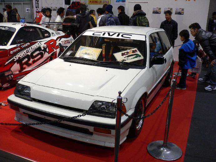 カーショーにて撮影